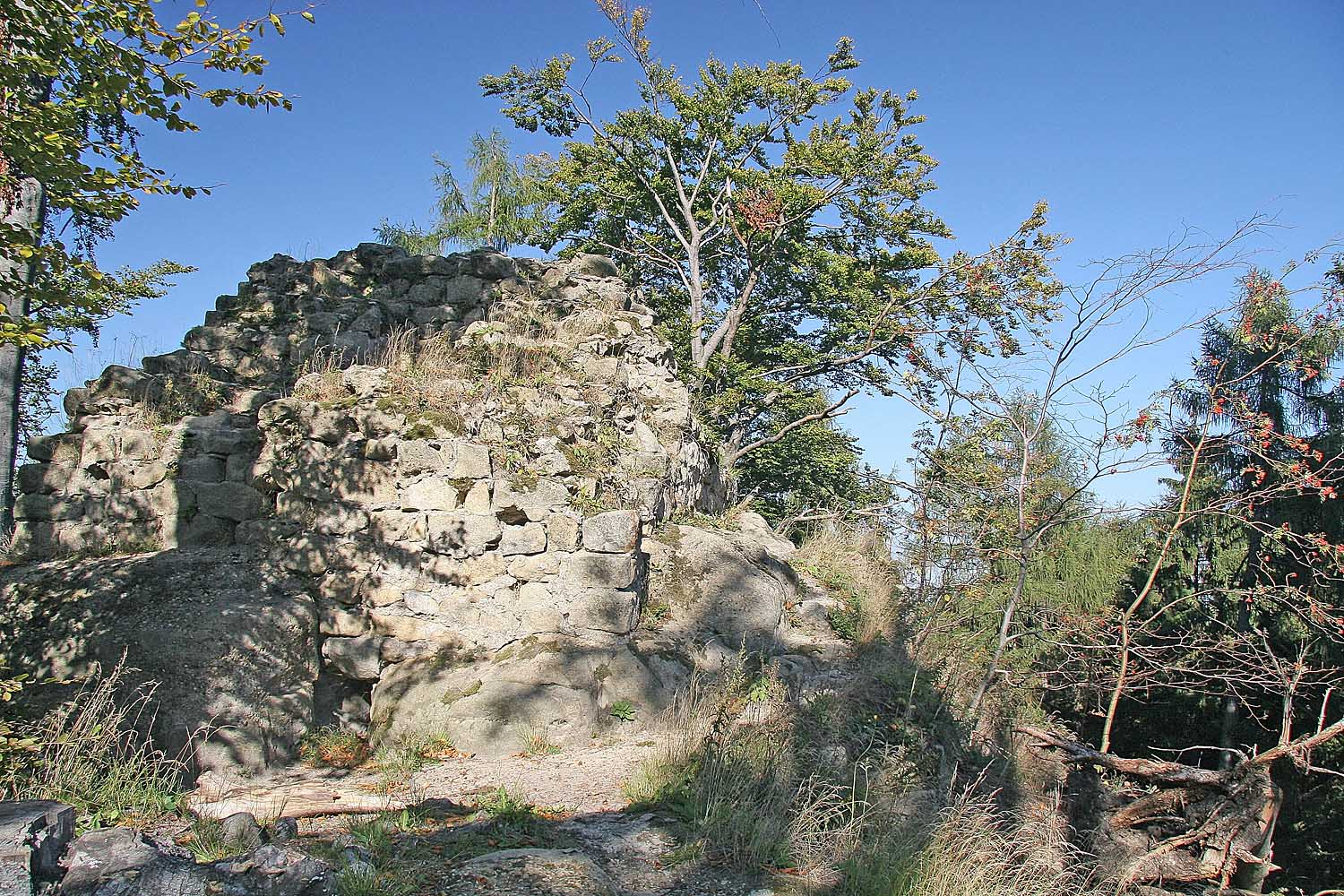 Ruine der Burg Karlsfried near Town Zittau in Sachsen, Germany autor: Prazak date: 22. 9. 2006